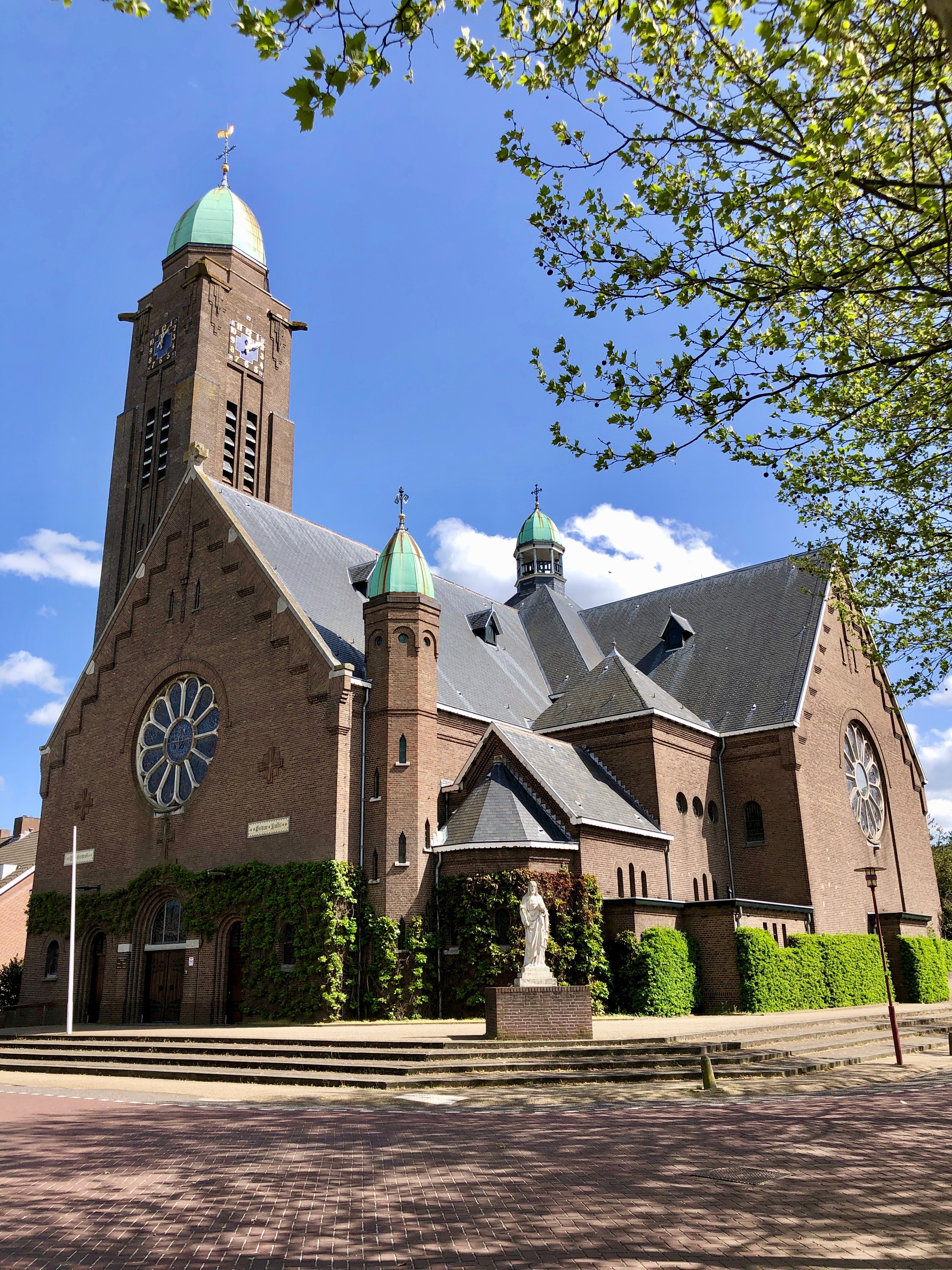 Zicht op een deel van de Willibrorduskerk (Teteringen) in Teteringen